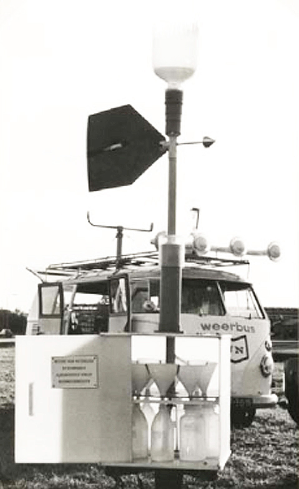 Regenmeter